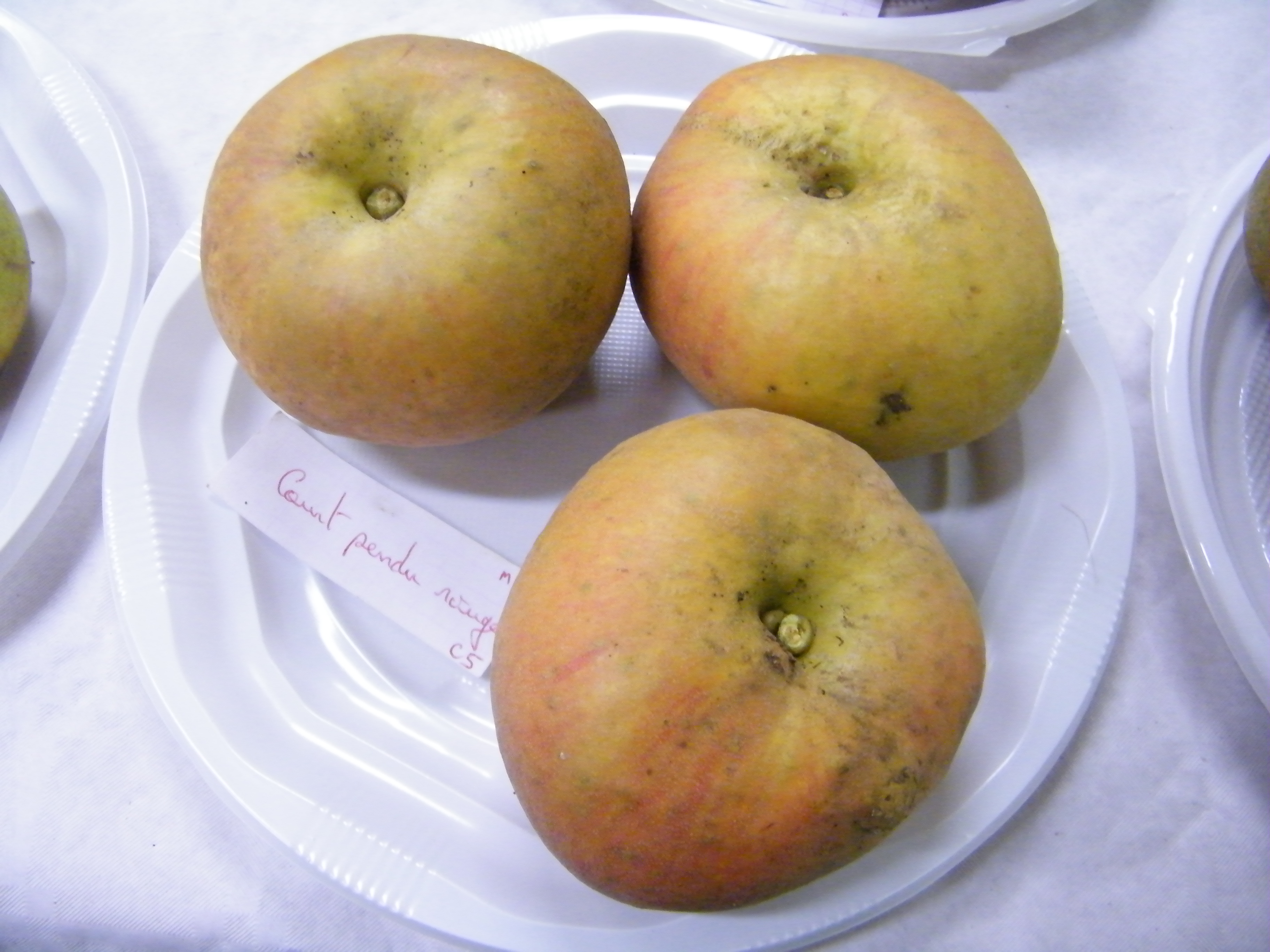 Court Pendu Rouge, Mons-Boubert, Somme, Fr, 23 octobre 2015.